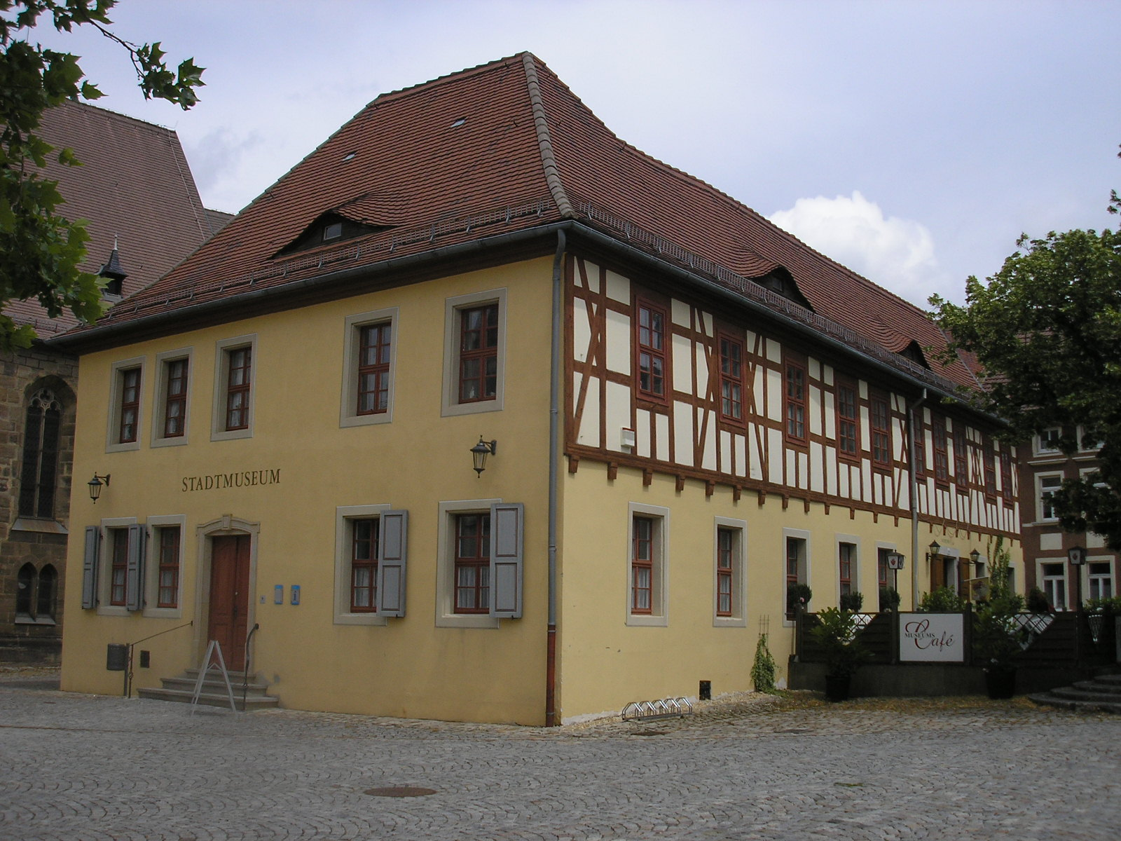 Das Stadtmuseum von Eisenberg (Thüringen).